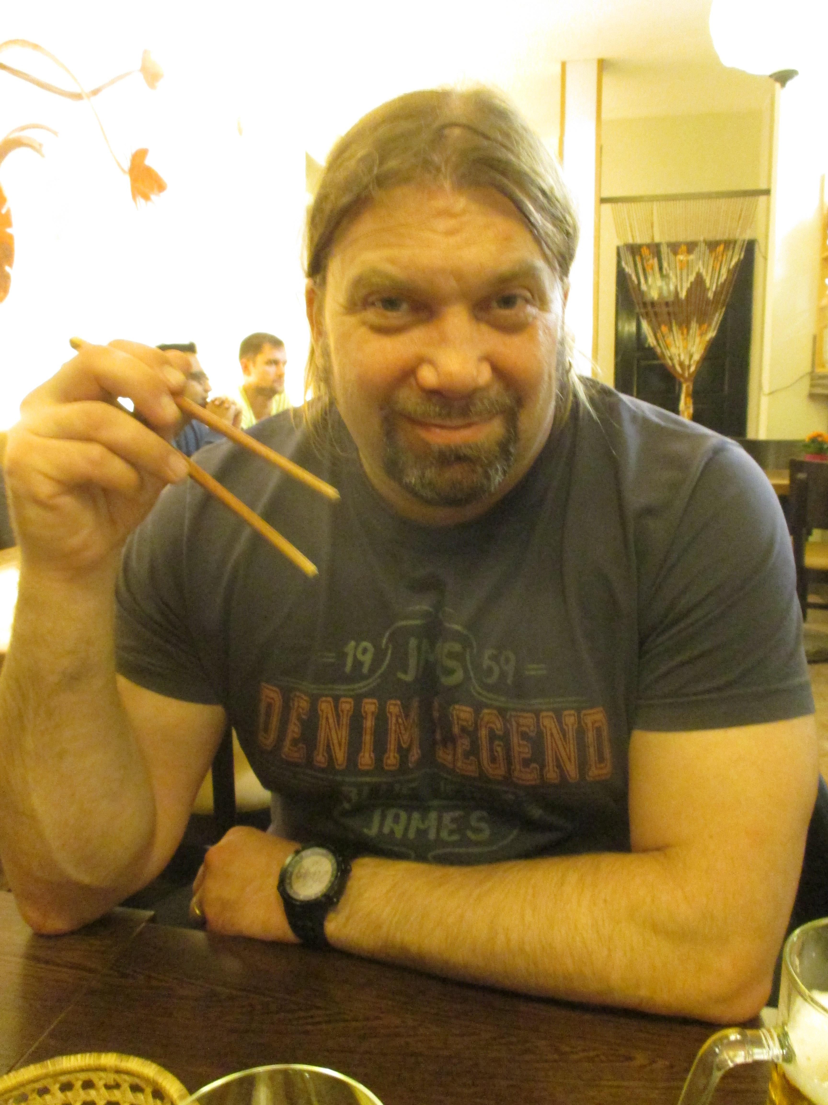 Ralf Andtbacka, 2016